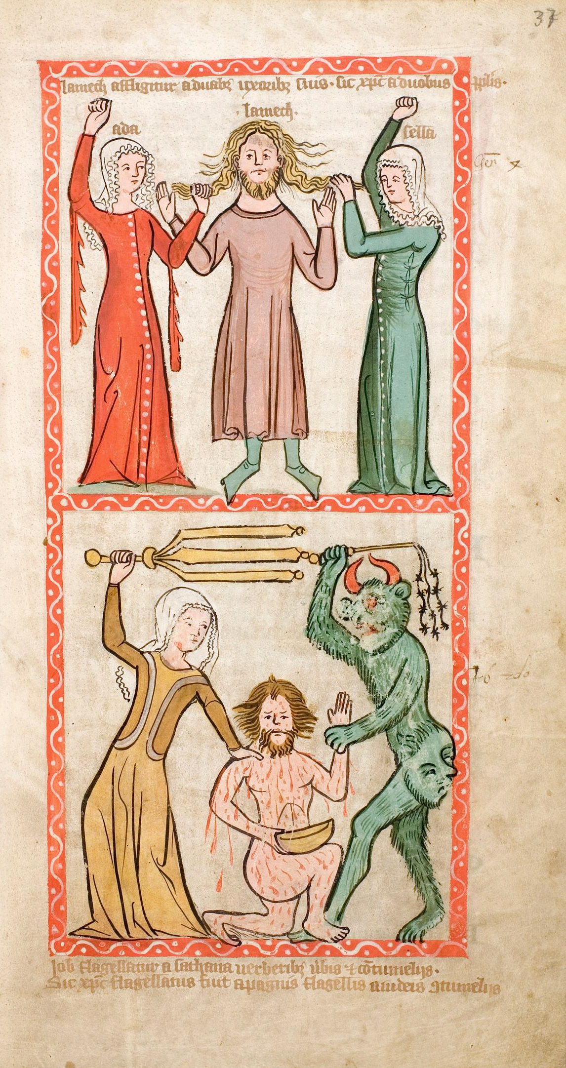 Speculum Humanae Salvationis, Westfalen oder Köln, um 1360. ULB Darmstadt, Hs 2505, fol. 37r